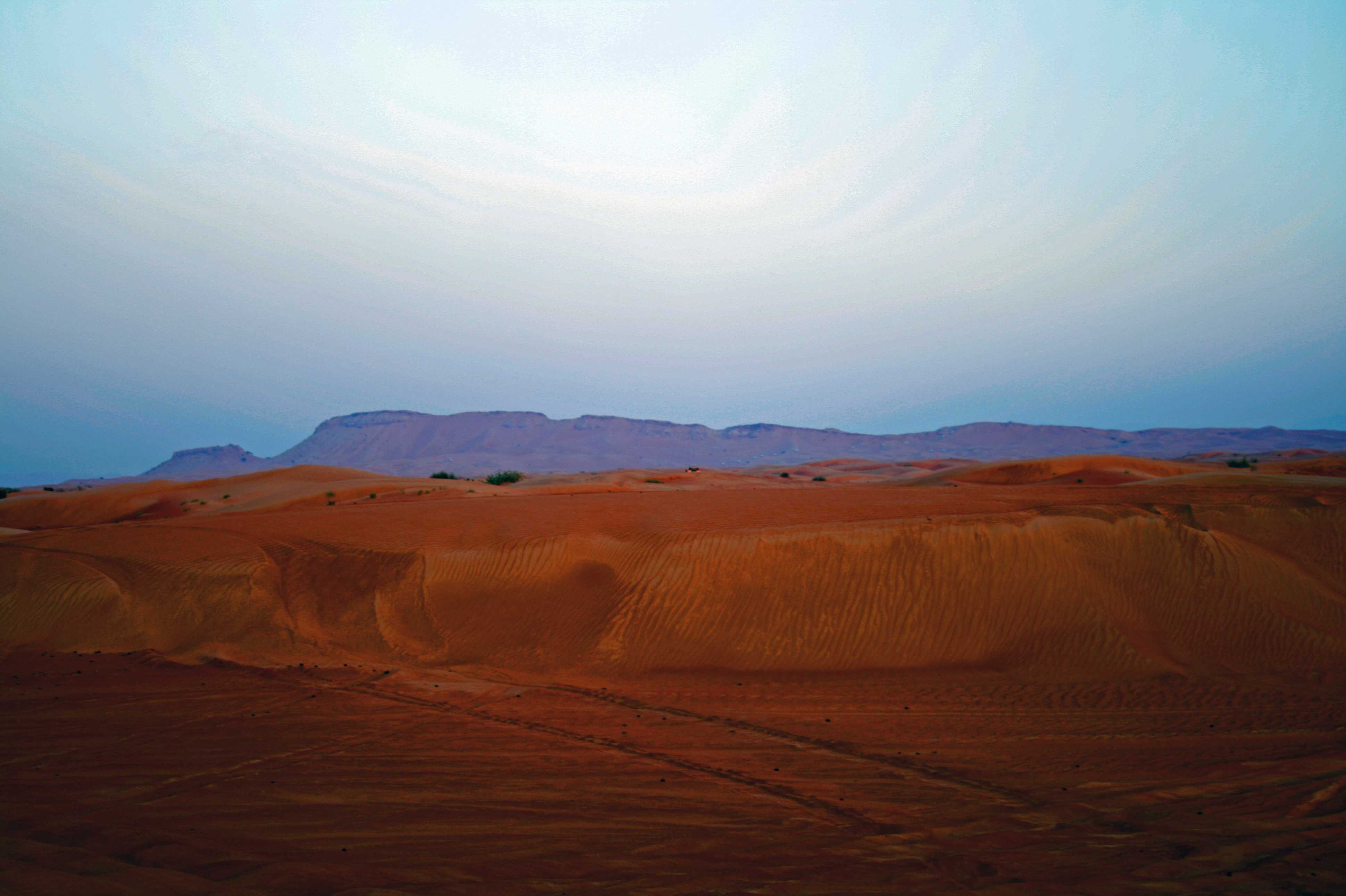 Vereinigte Arabische Emirate; Dubai; Wüste; Sonnenuntergang